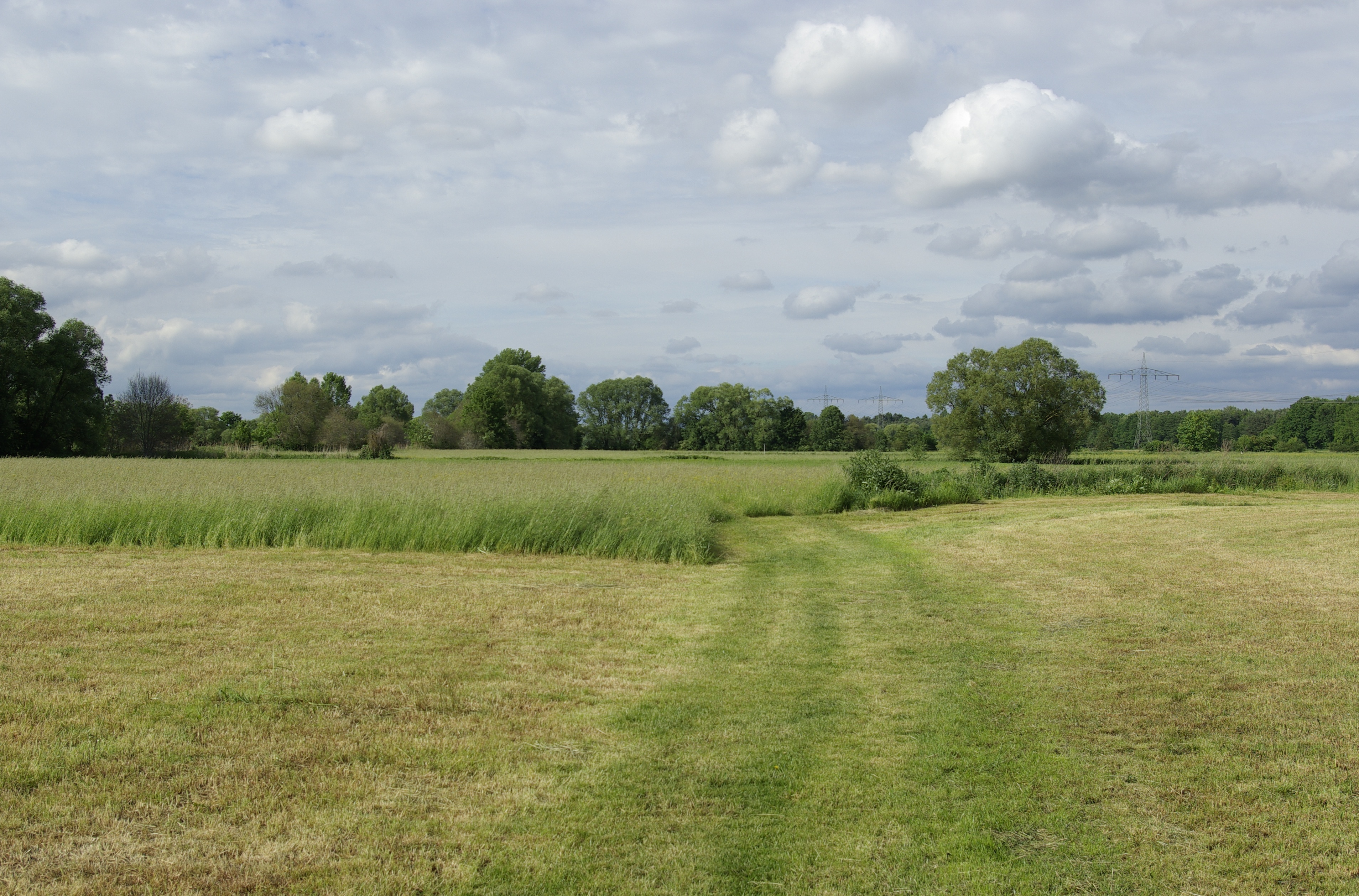 Das Regnitztal zwischen dem Fürther Stadtteil Mannhof und dem Erlanger Stadtteil Eltersdorf.